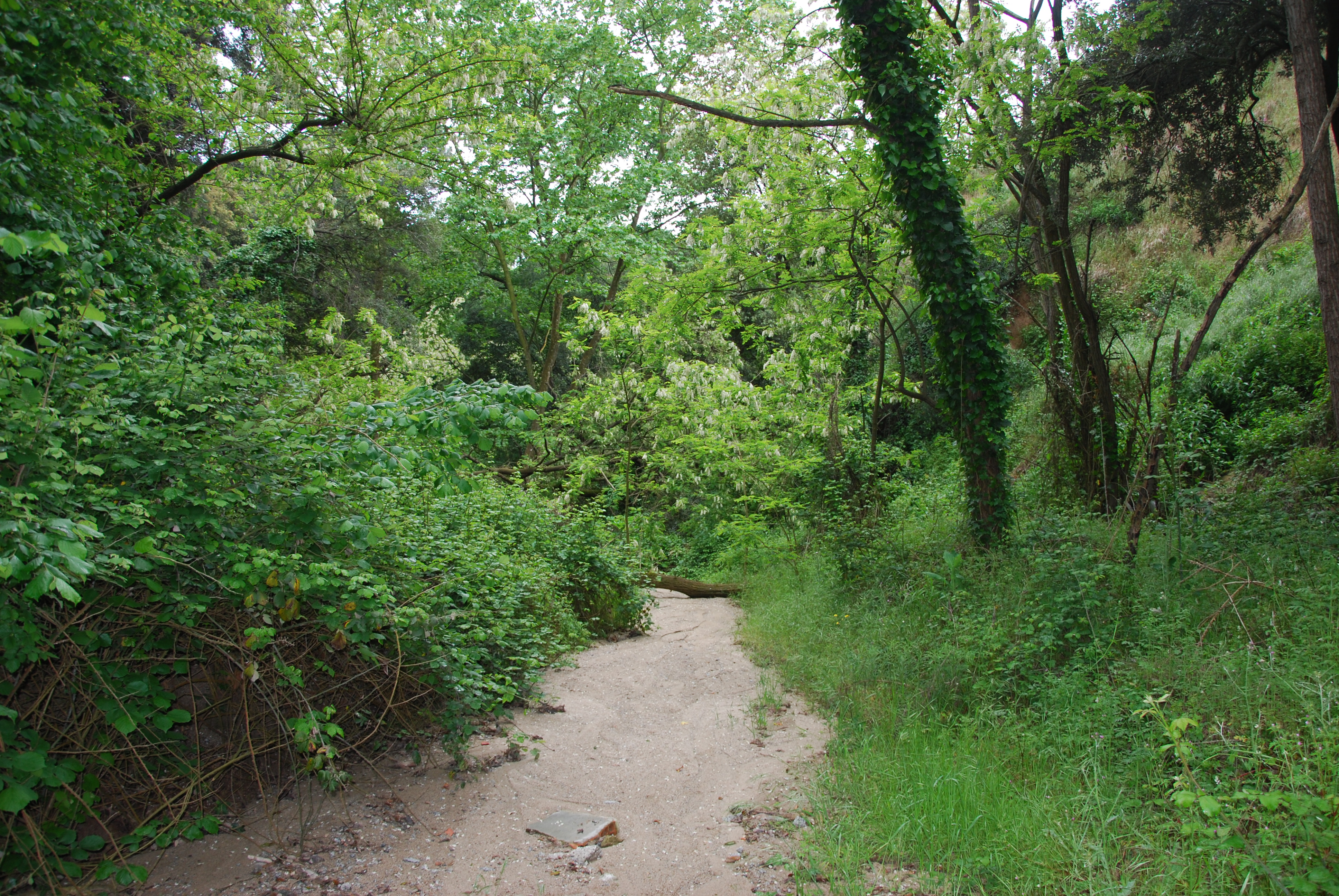 El torrent de la Vallençana al seu pas per Can Devesa (Badalona).